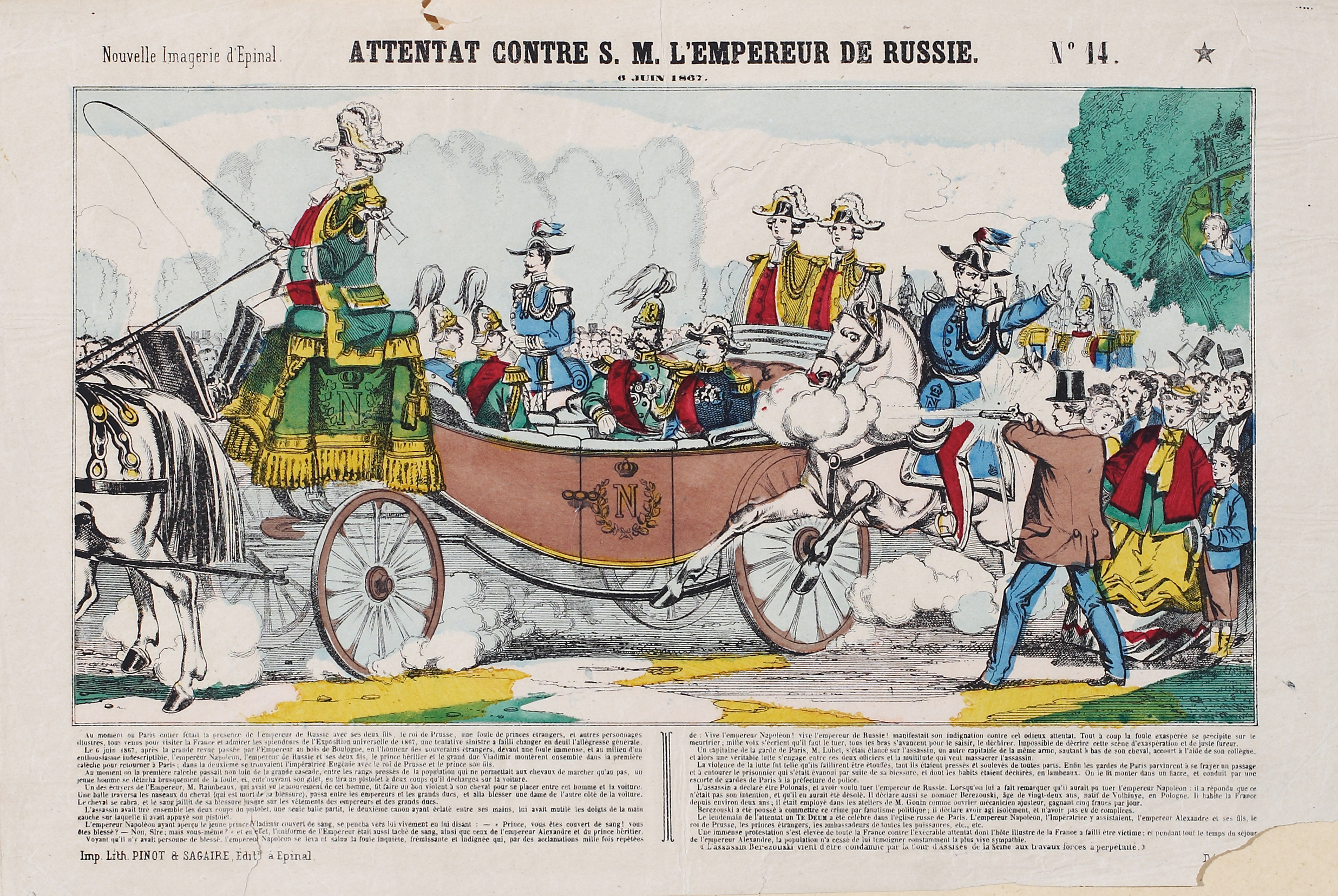 ATTENTAT CONTRE S.M. L'EMPEREUR DE RUSSIE (1867-05-25). Nouvelle Imaqerie d'Epinal 6 juin 1867№14.